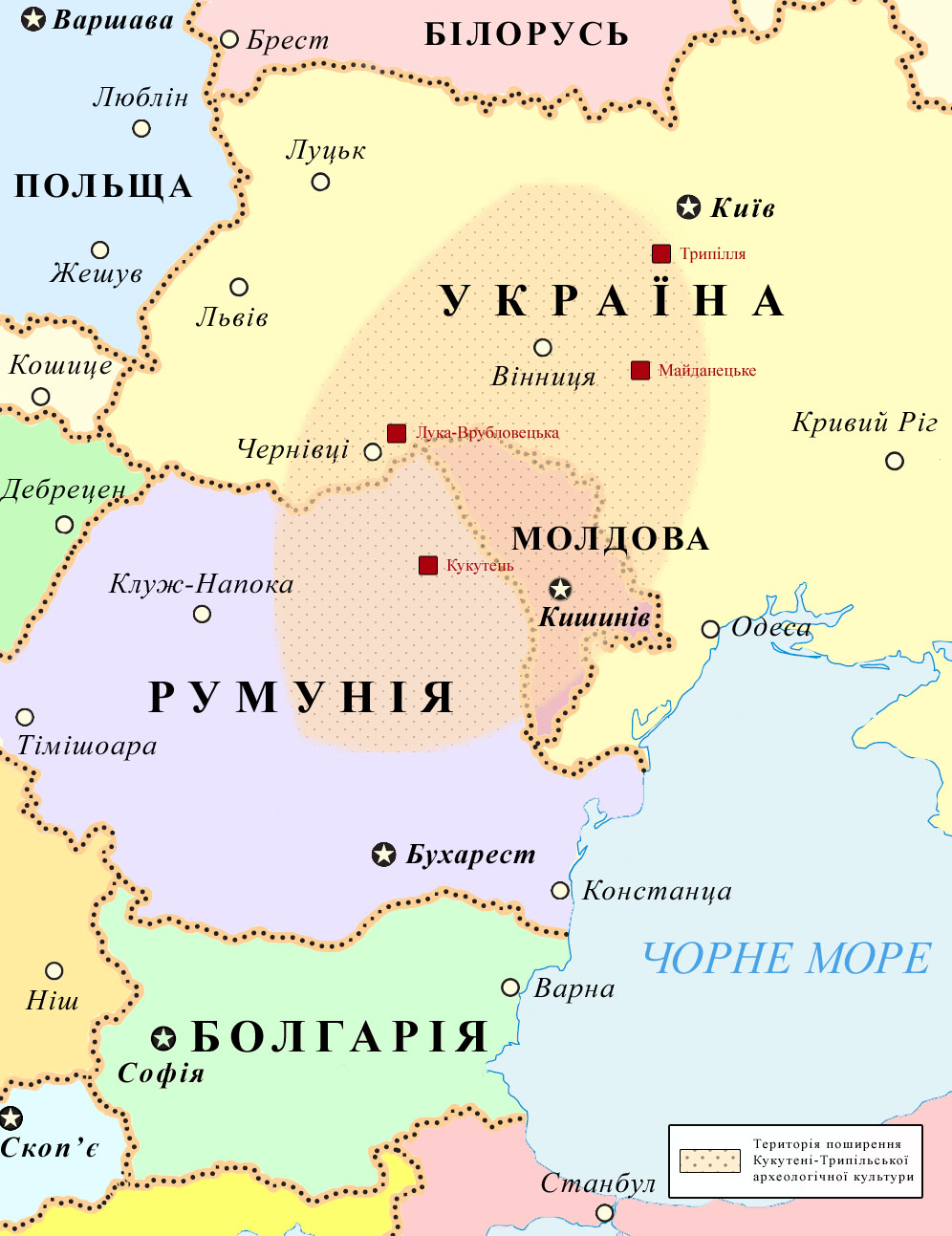 Карта поширення Кукутені-Трипільської культури на територіях України, РумуІнії та Молдови. Варіант українською мовою.